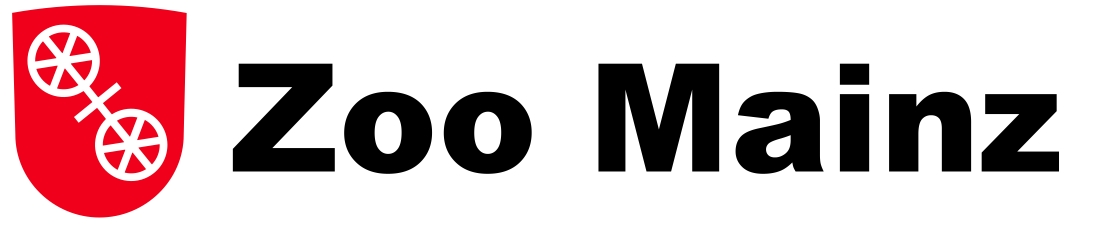 Logo des Zoos Mainz